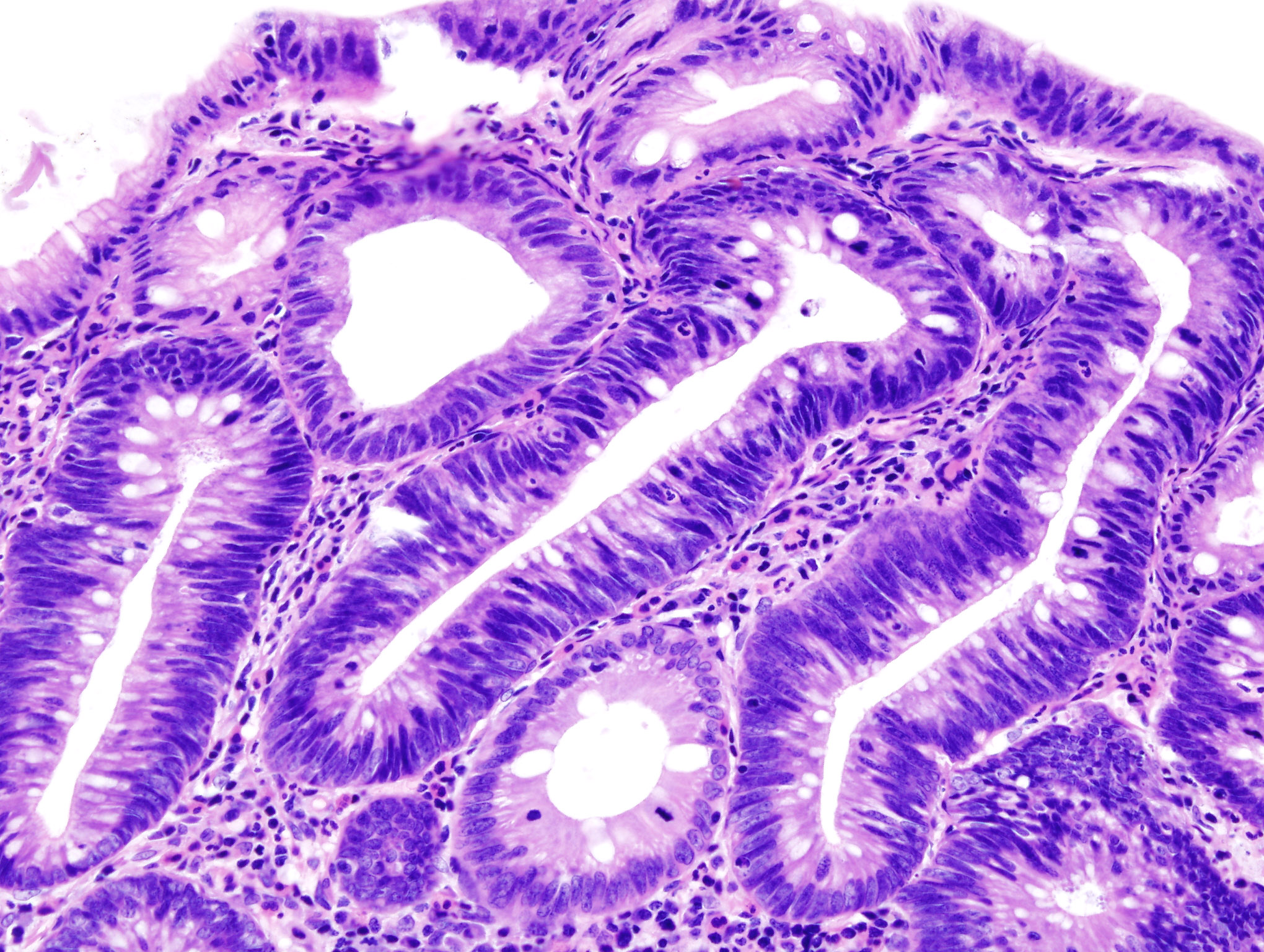 Adenoma de colon. Adenomatous polyp of colon from polypectomy specimen. Hematoxylin-eosin stain.